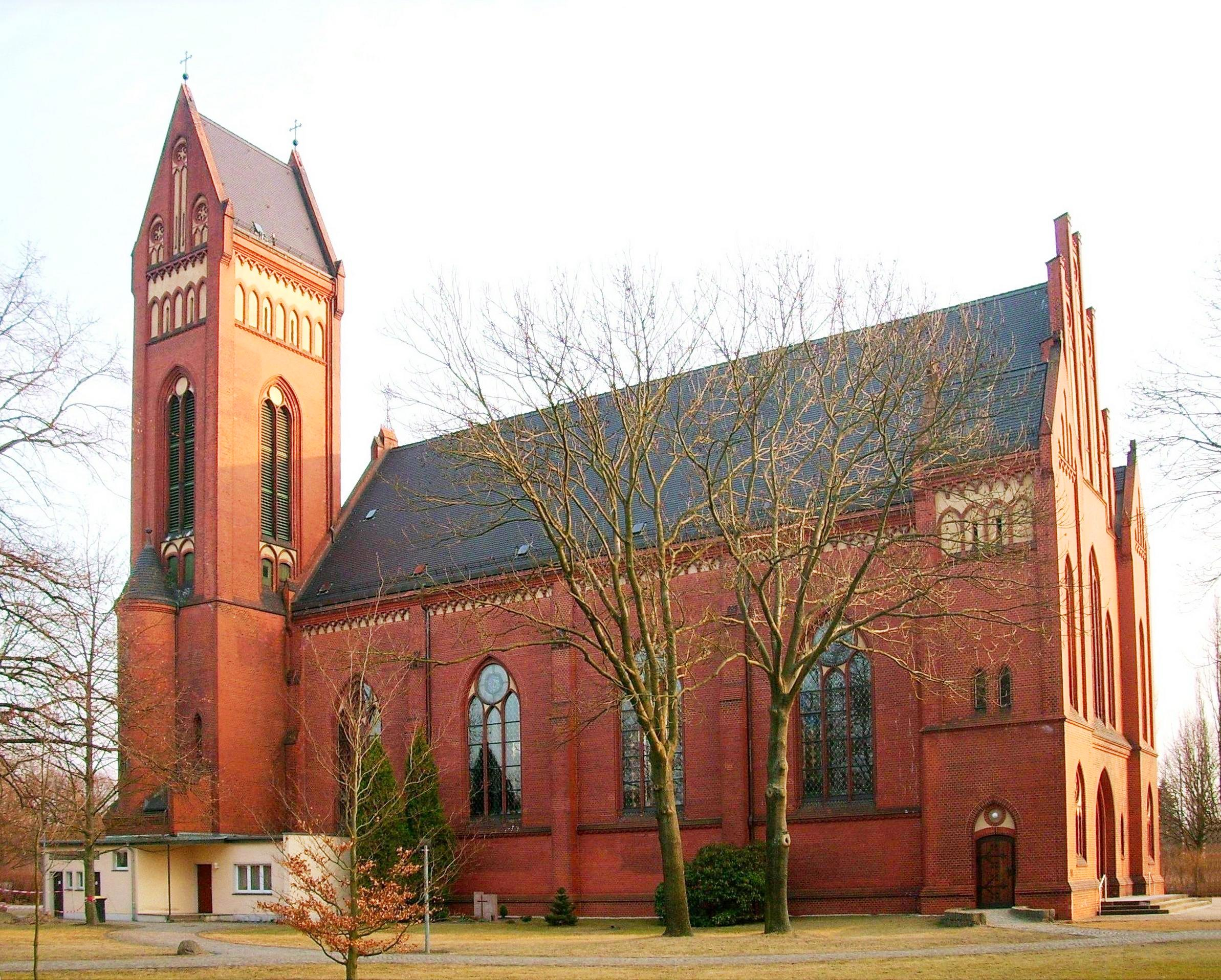 Katholische Kirche „Heilige Familie“, Karl-Liebknecht-Straße 18 in Hoyerswerda